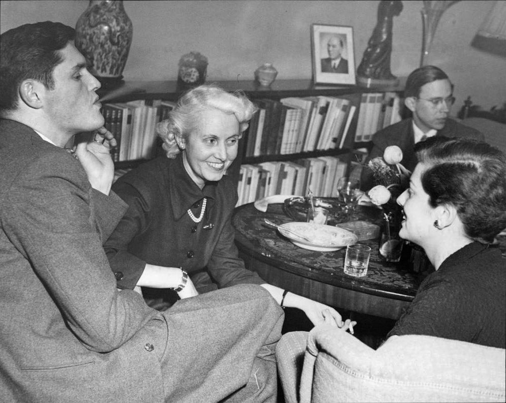 För att sammanföra Sverige-Amerikastiftelsens egna stipendiater och och de amerikanska studenterna vid American college vid Stockholms högskola, som stiftelsen tagit initiativet till, anordnade stiftelsens direktör fru Adèle Heilborn på tisdagskvällen ett party för 24 amerikanska studenter och deras vänner. På bilden ses från vänster herr Lennart Lokrantz, som studerat i USA, fru Heilborn, fröken Jessie Thomas från Norfolk, Virginia, samt i bakgrunden Carlton Apello.